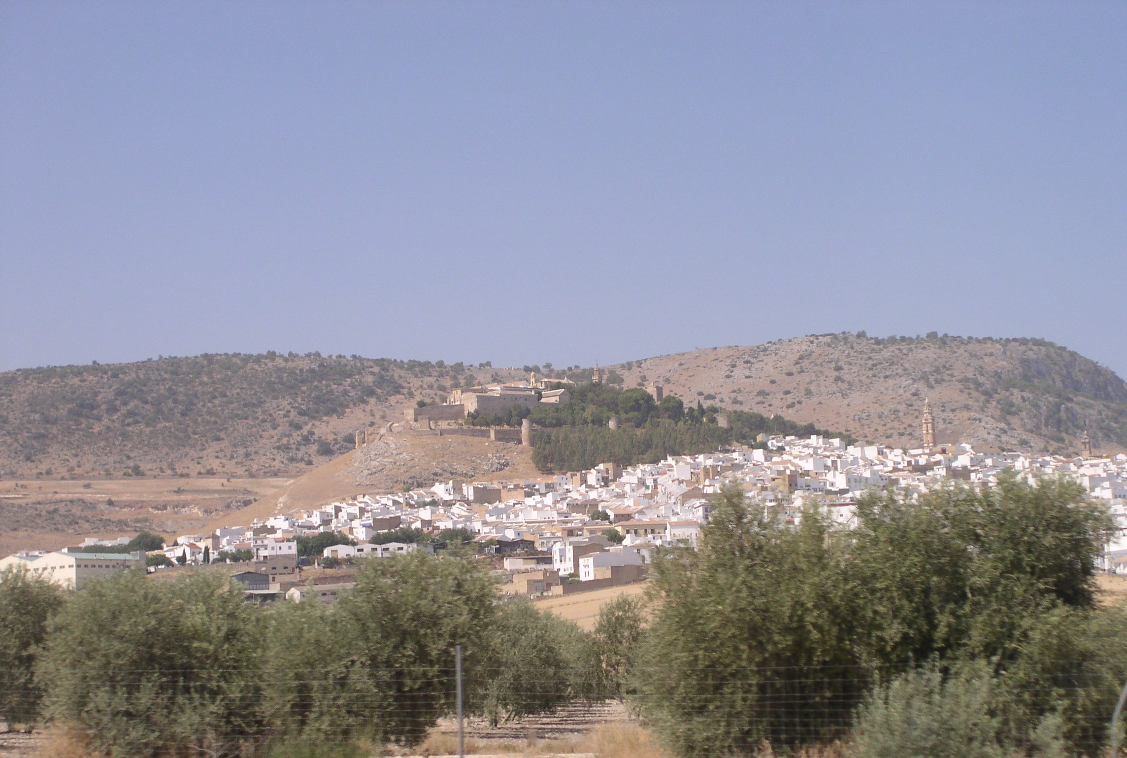 View of Antequera (Andalucia, Spain) from the A92 highway/Vista de la ciudad de Antequera (Andalucía,España) desde la carretera A92